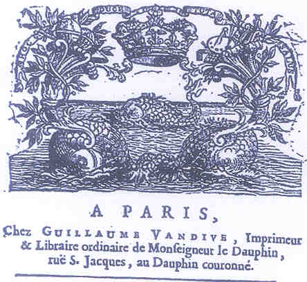 Marque typographique de l'imprimeur parisien Guillaume van Dievoet dit VANDIVE